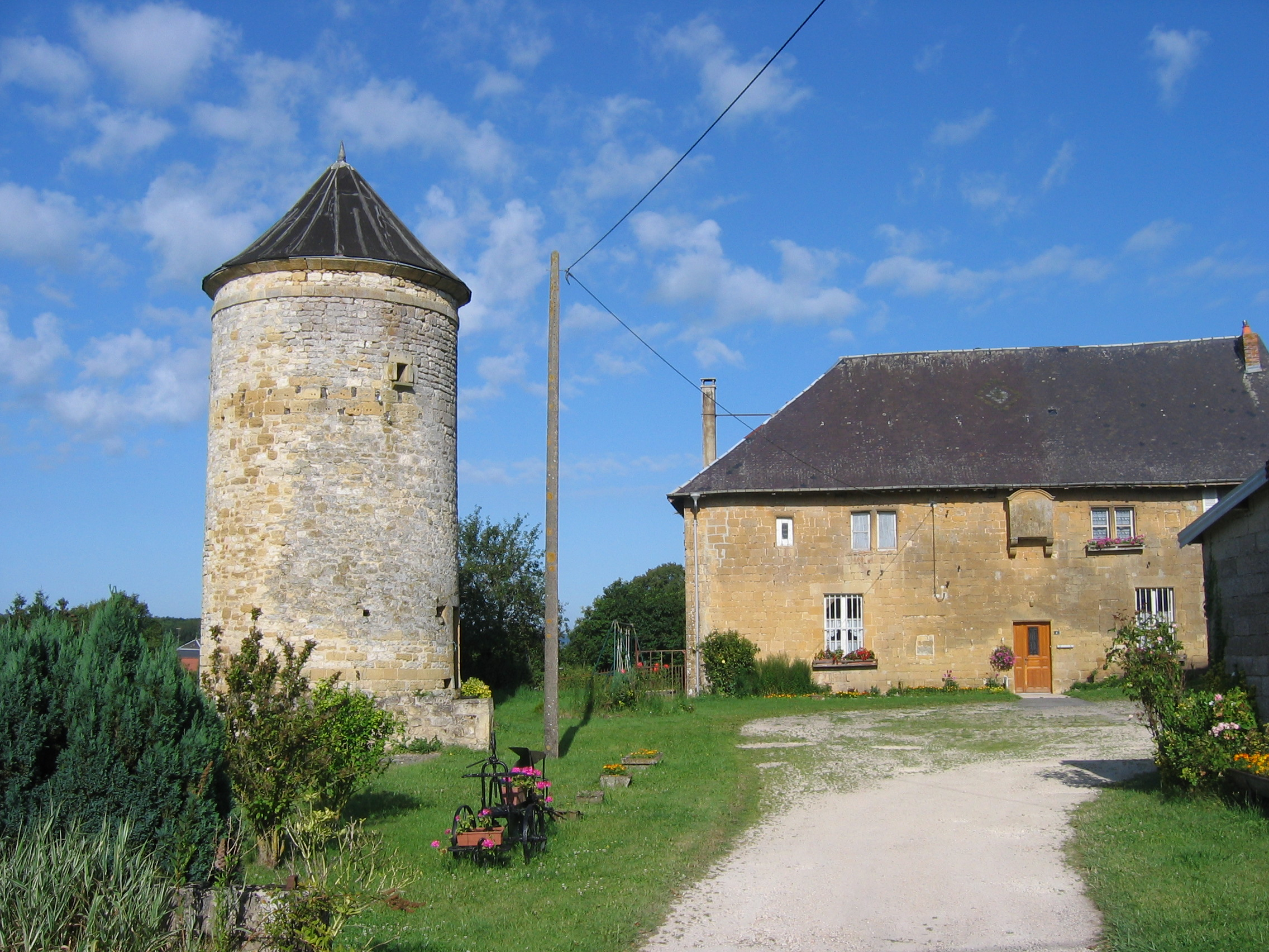 Maison forte de la chambrerie St-Georges et moulin, à Harricourt, Ardennes, France